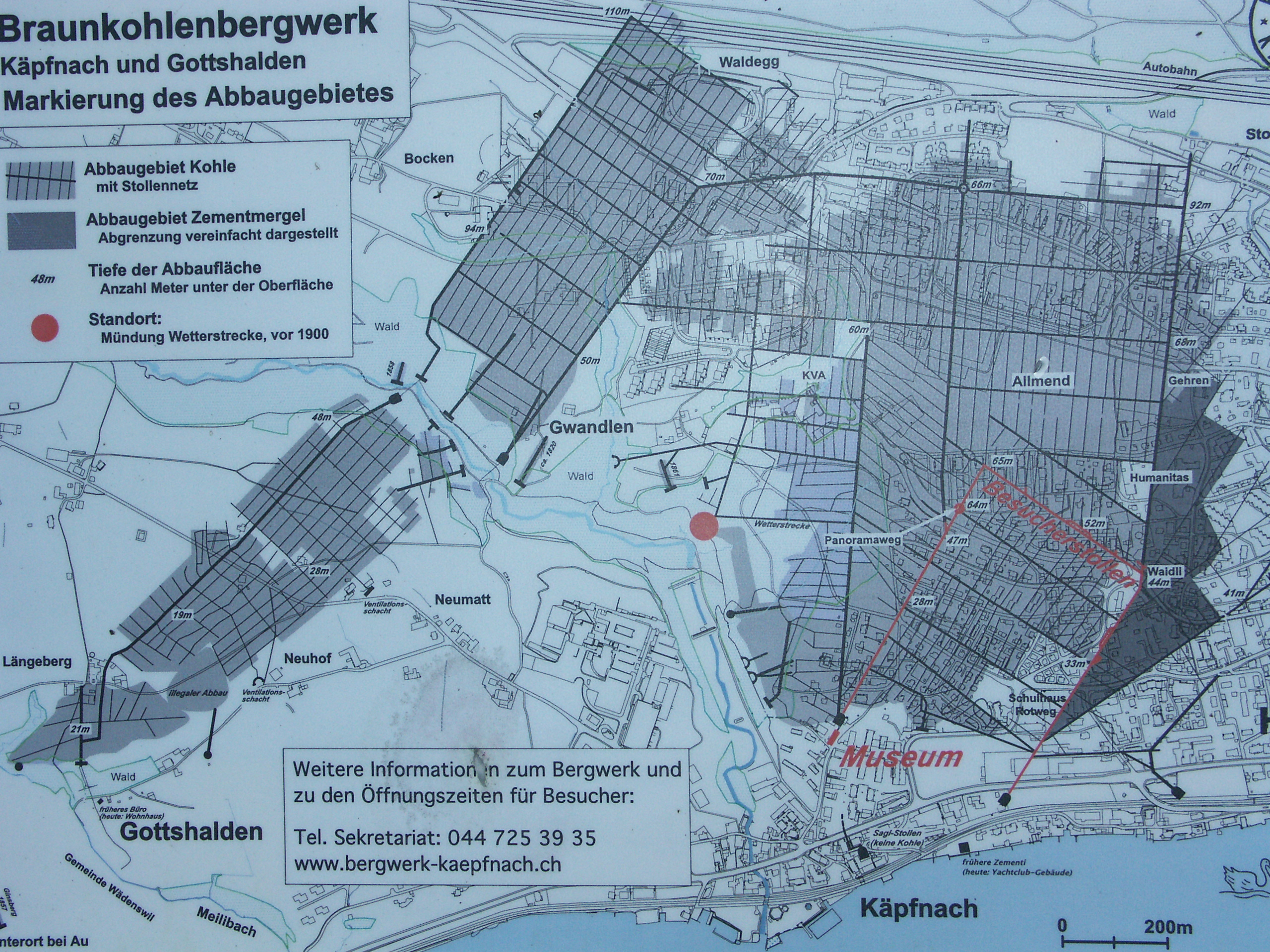 Käpfnach Aabachtobel, Bergwerkschild an der Wetterstrecke